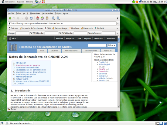 Captura de pantalla del escritorio GNOME en su versión 2.24